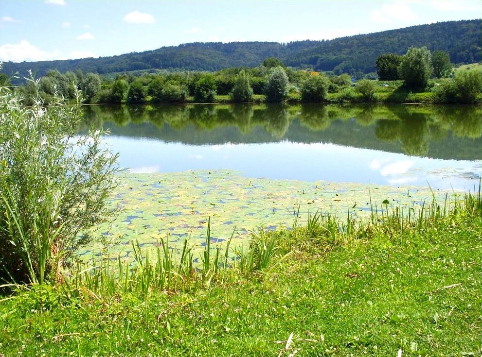 Nebensee des Plüderhausener Sees und Naturschutzgebiet.